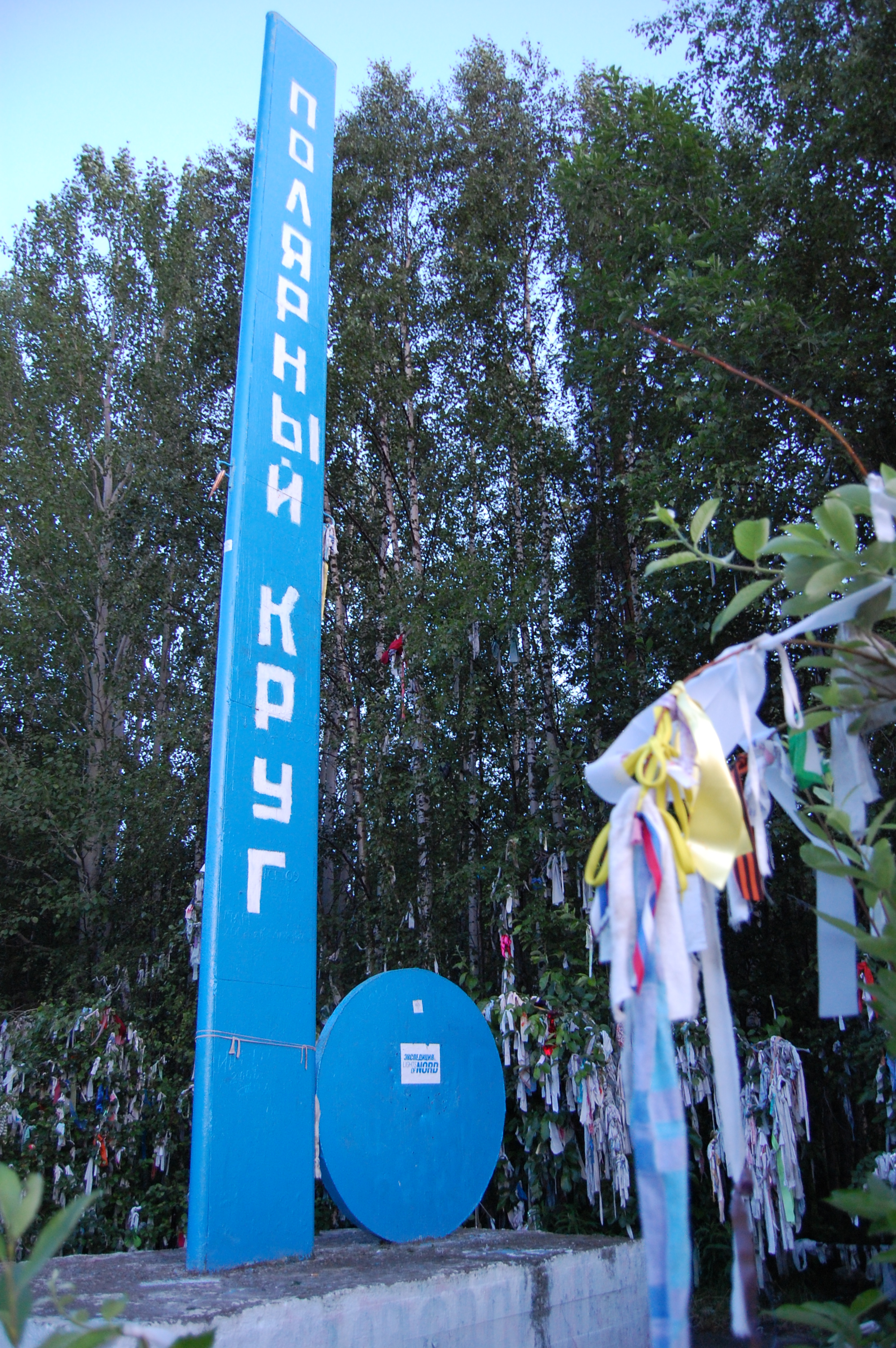 Символ пересечения полярного круга, Россия